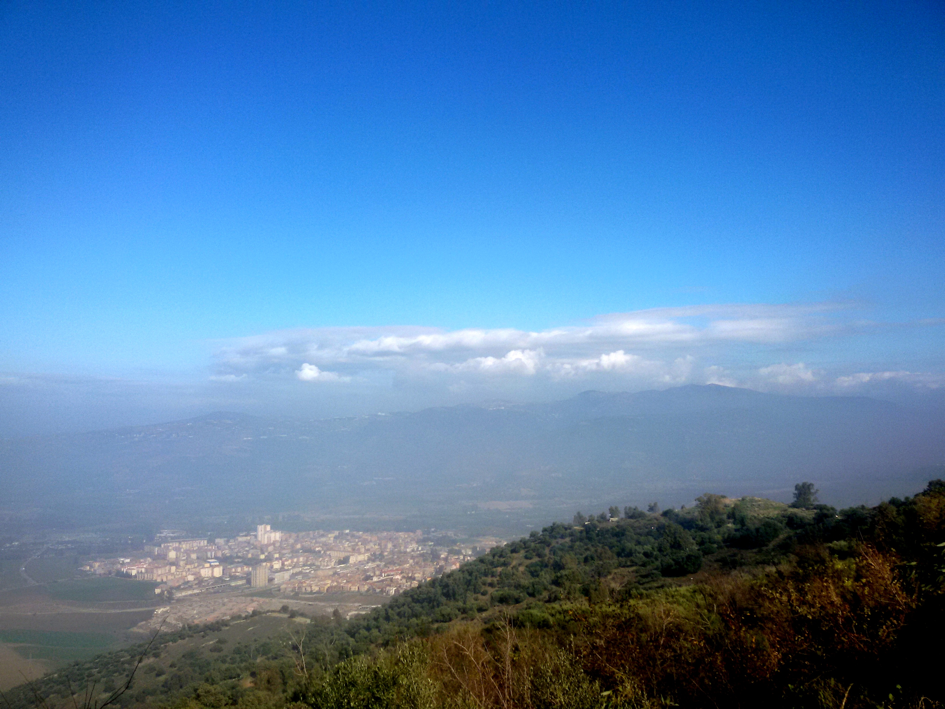 Vue sur le chef-lieu de la commune de Tadmaït, depuis les hauteurs du mont Sidi Ali Bounab.